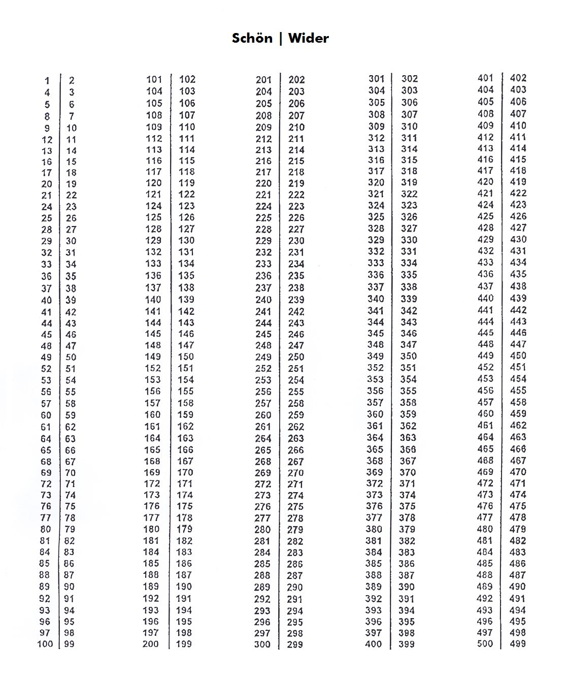 Seitenangabe für Schön- und Widerdruckseiten